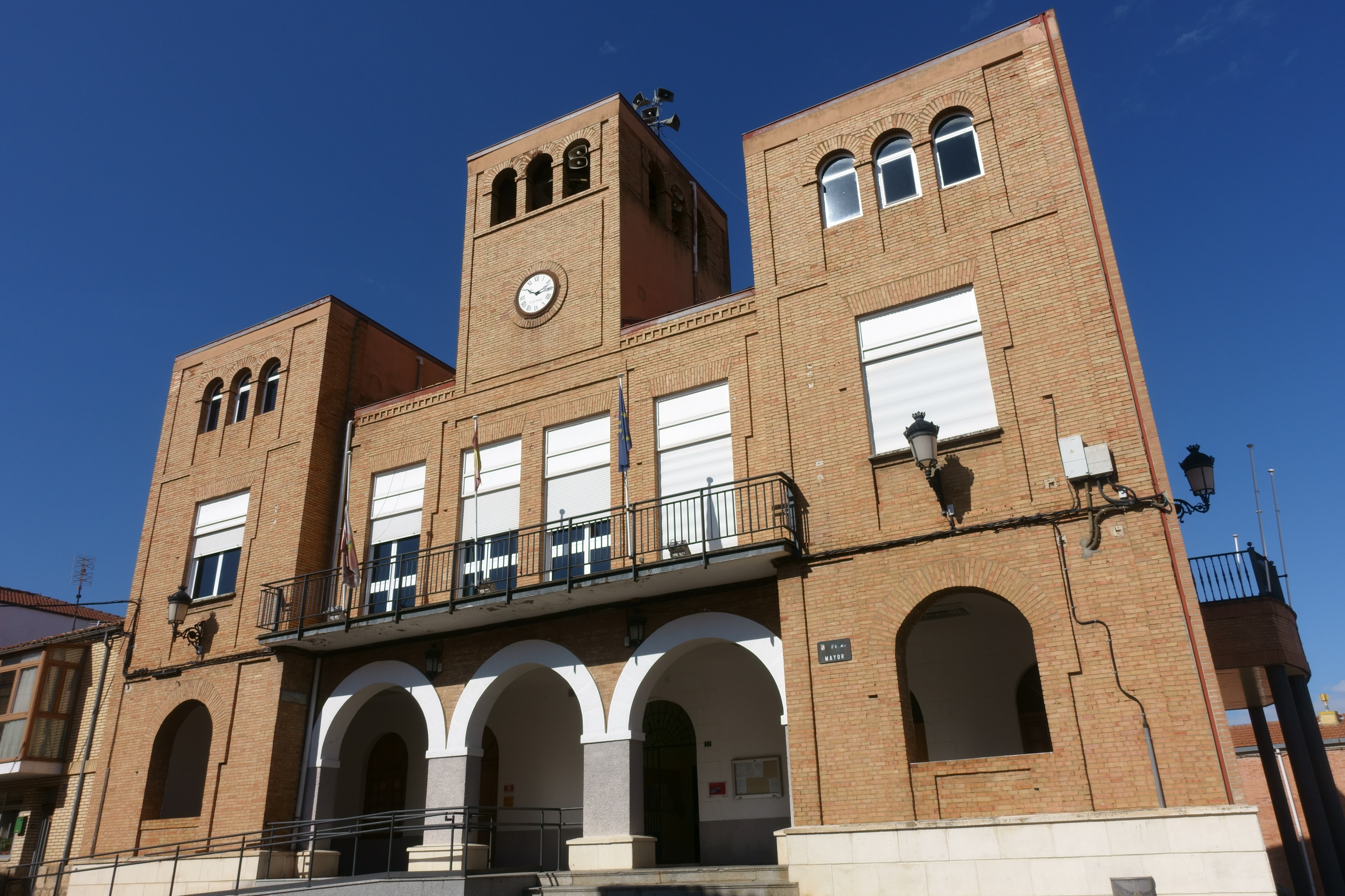 Casa consistorial de Matamala de Almazán (Soria, España).